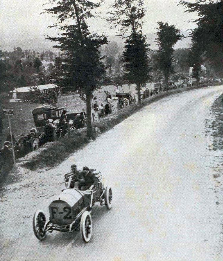 Grand Prix de l'ACF 1907, Felice Nazzaro dans la descente de Londinières.